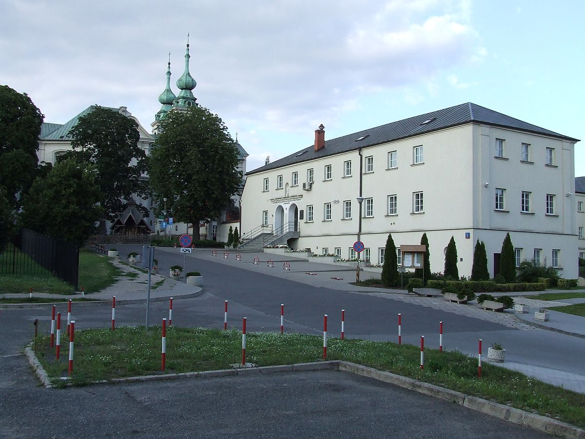 Uniwersytet Kardynała Stefana Wyszyńskiego